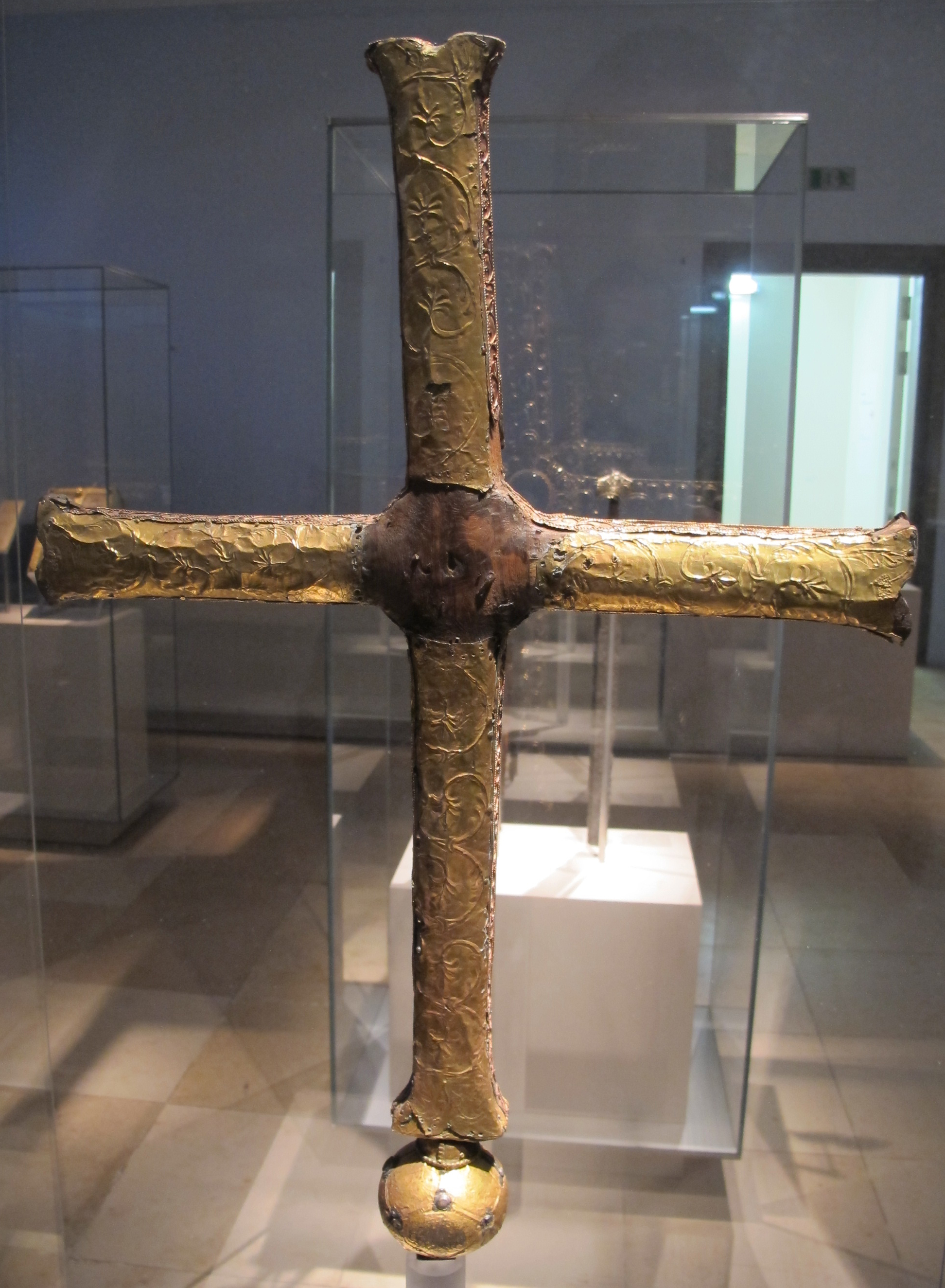 Ardennenkreuz (croce processionale), francia del nord o germania occ.le, 825-850 ca